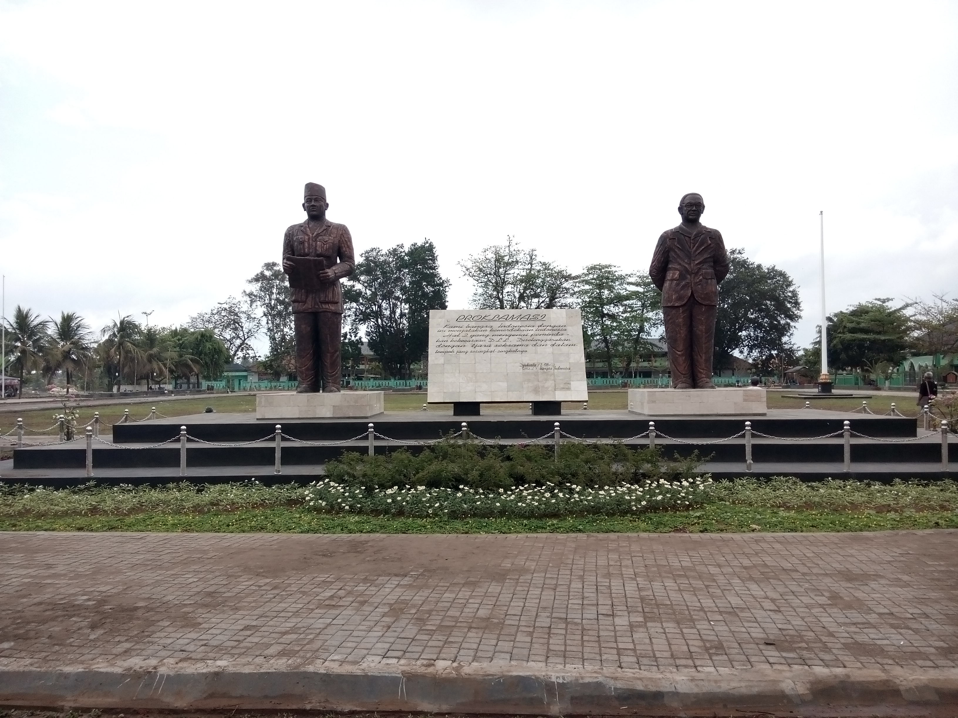 Patung Soekarno Hatta ini sebagai simbol semangat kemerdekaan